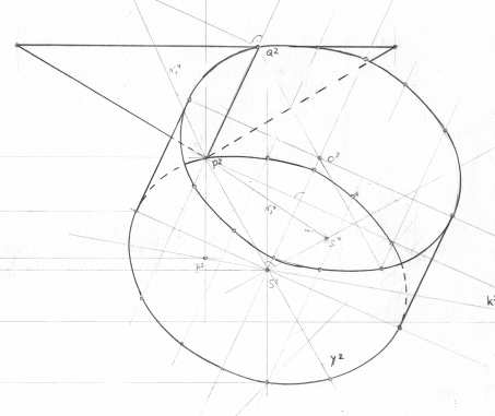 konstrukcja przestrzenna geometrii wykreślnej (połowa -- jeden rzut)